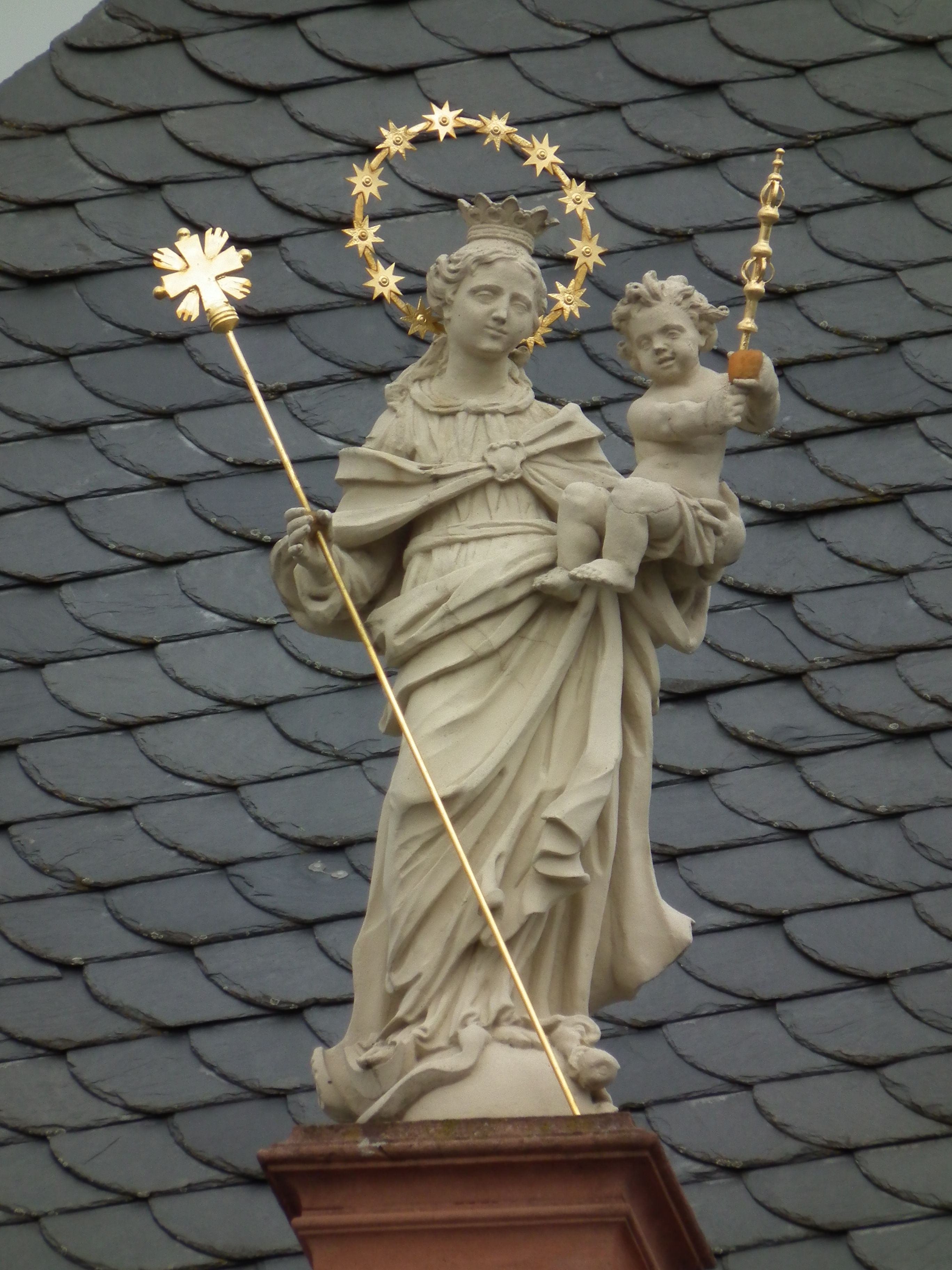 Darstellung einer Maria Immaculata auf dem Dach der katholischen Pfarrkirche St. Pankratius in Schwetzingen (Rhein-Neckar-Kreis, Baden-Württemberg, Deutschland)